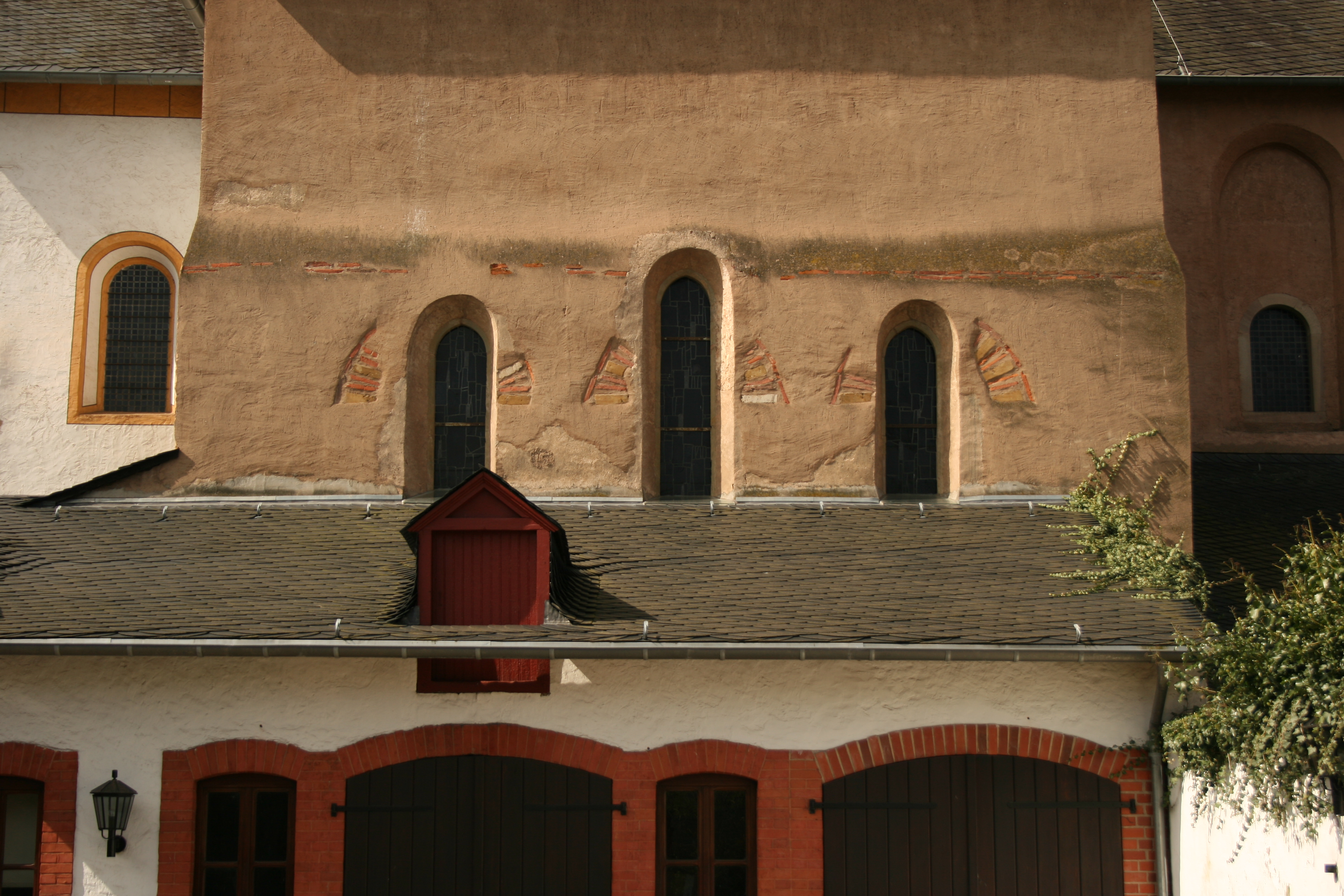 Trier-Pfalzel, Römisches Mauerwerk des Palatiolum in heutiger Kirche.